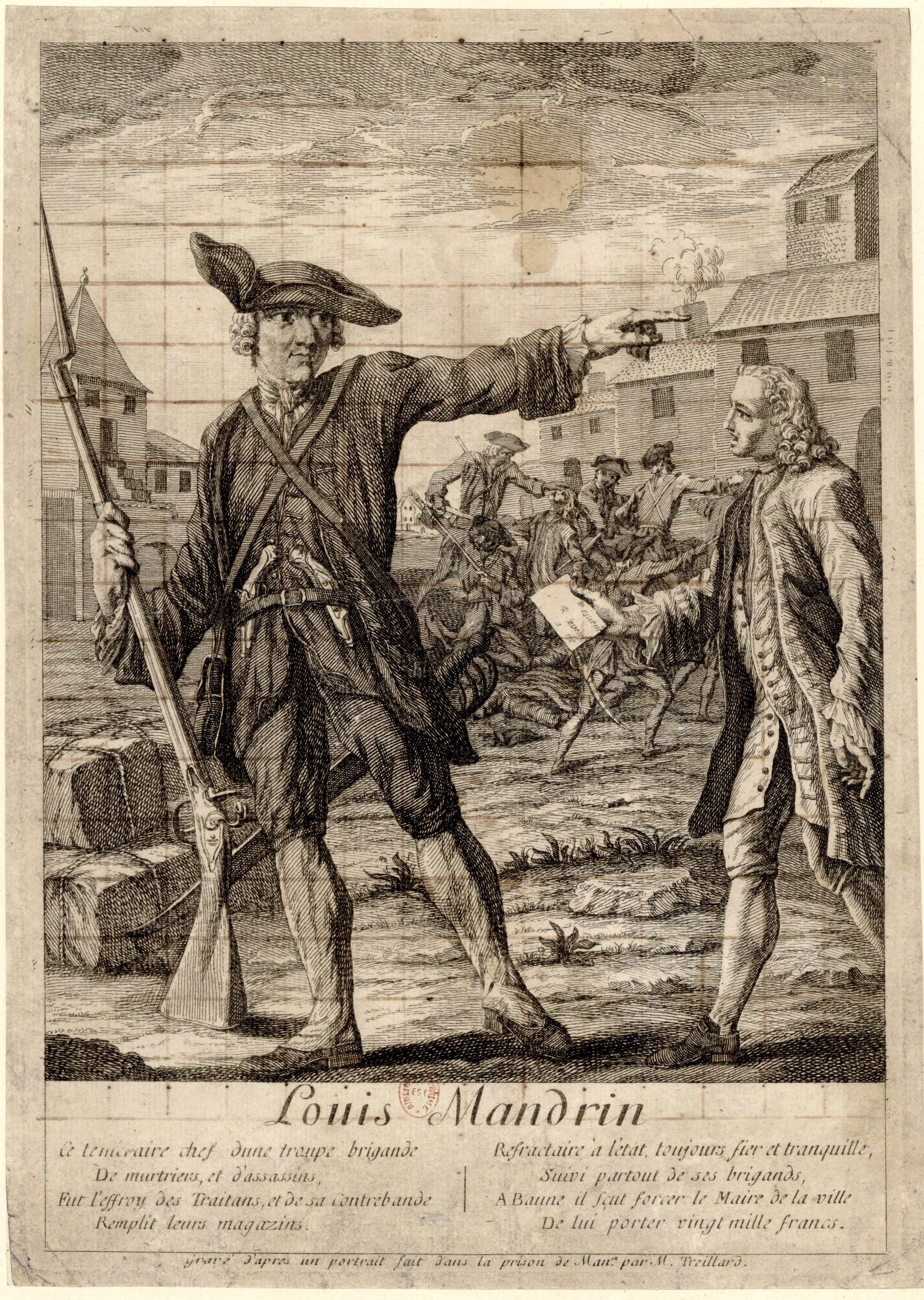 Louis Mandrin (1725-1755)